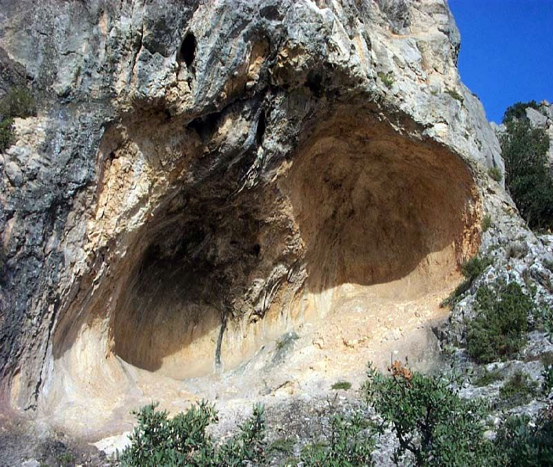 Abric de La Sarga (Alcoi)